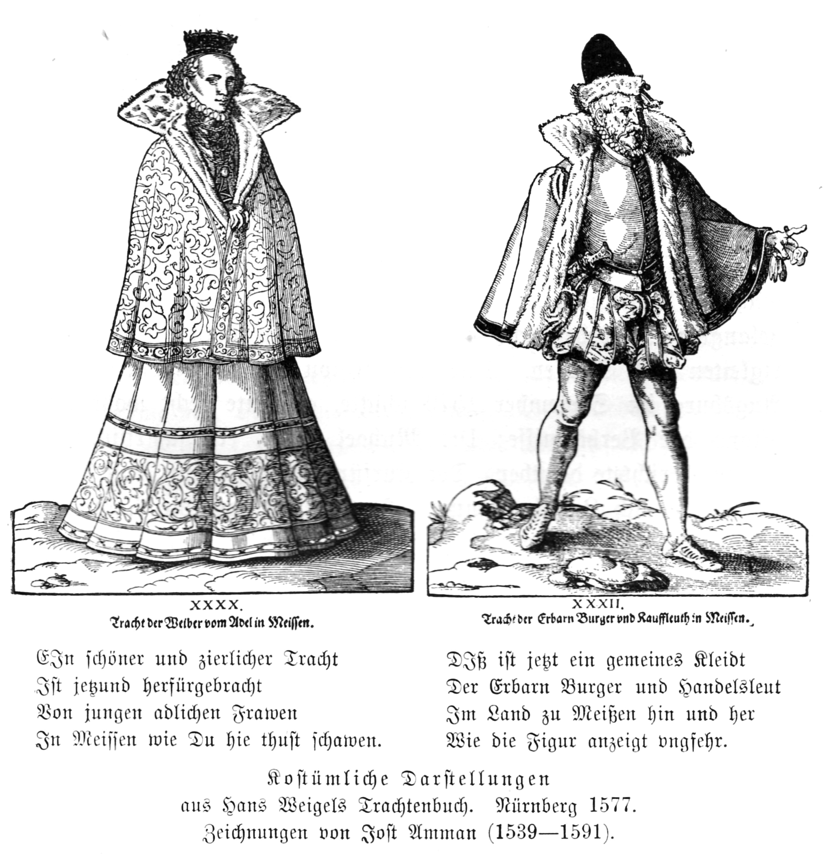 Kostümliche Darstellungen aus Hans Weigels Trachtenbuch. Nürnberg 1577. Zeichnungen von Jost Amman (1539–1591).